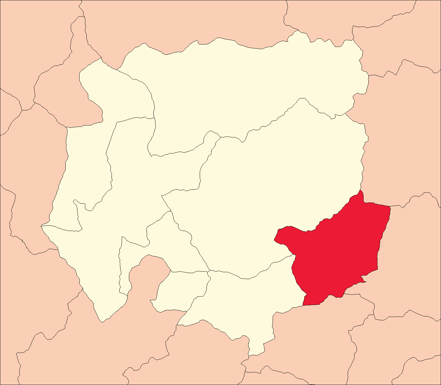 Ubicación del distrito de Jacas Chico.